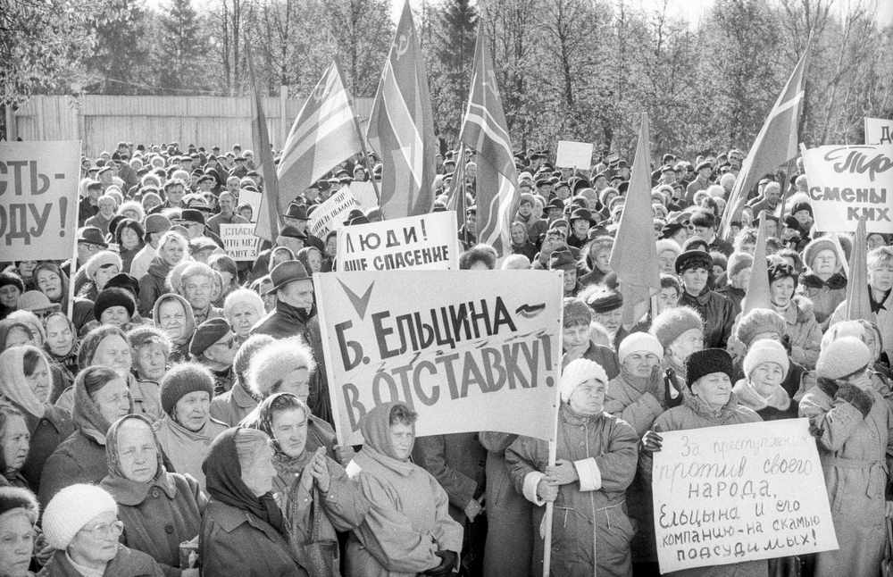 7 октября 1998 года на Народной площади состоялся митинг трудящихся и ветеранов города Переславля и Переславского района в рамках Всероссийской акции протеста профсоюзов «Нет — губительным экономическим реформам». Принята резолюция, которая потребовала отставки президента Бориса Николаевича Ельцина и выразила доверие председателю правительства Евгению Максимовичу Примакову. Лозунги на плакатах: «Б. Ельцина — в отставку!», «За преступления против своего народа, Ельцина и его компанию — на скамью подсудимых!»